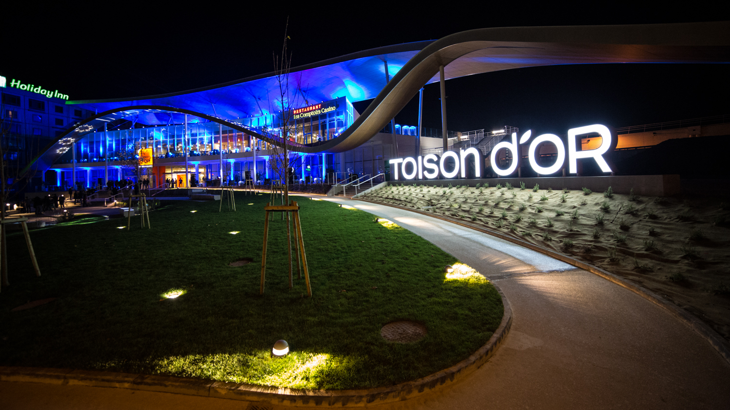 Place Marie de Bourgogne éclairé lors de l'inauguration du 30 octobre 2013